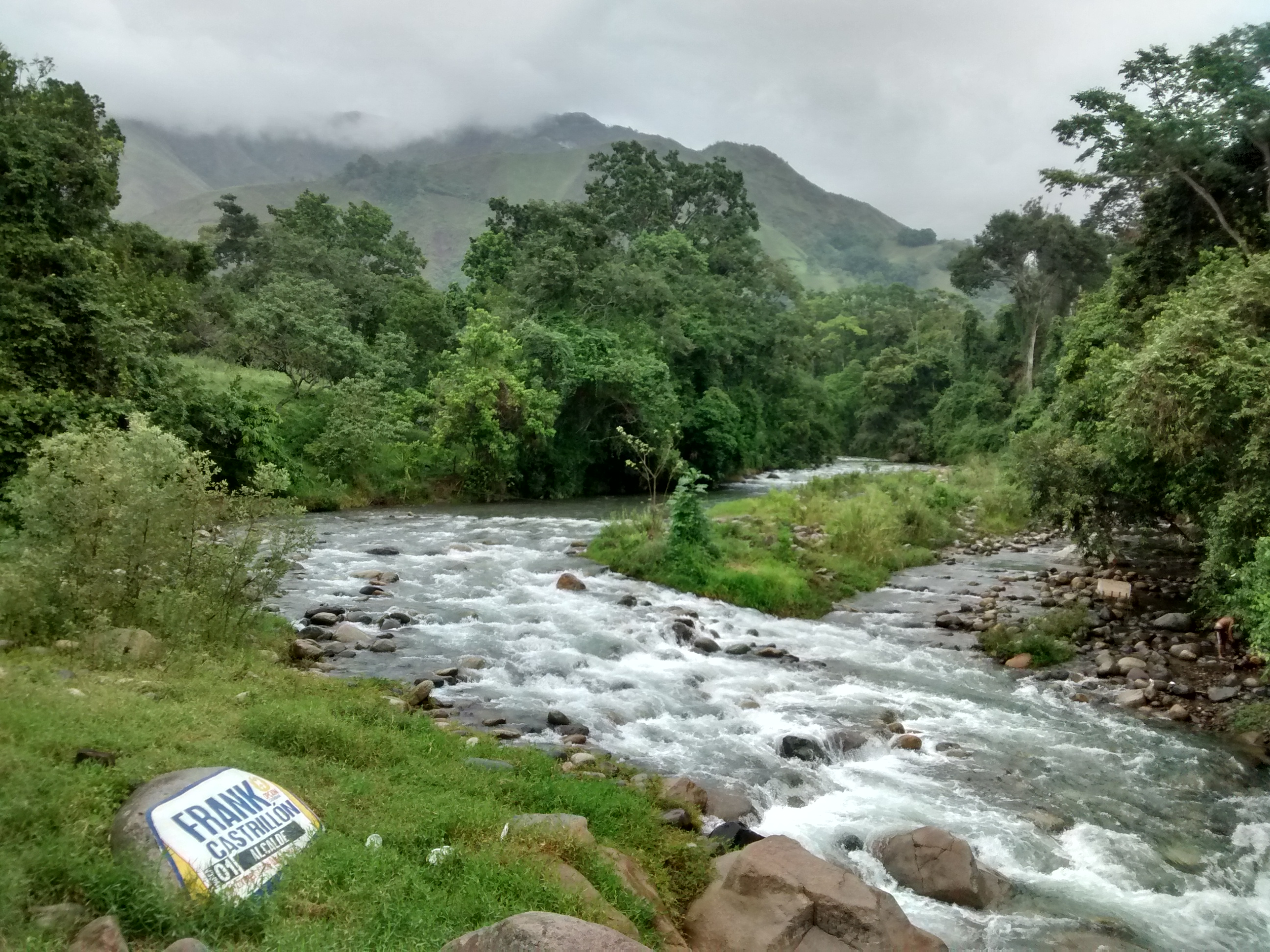 Ríos de Colombia